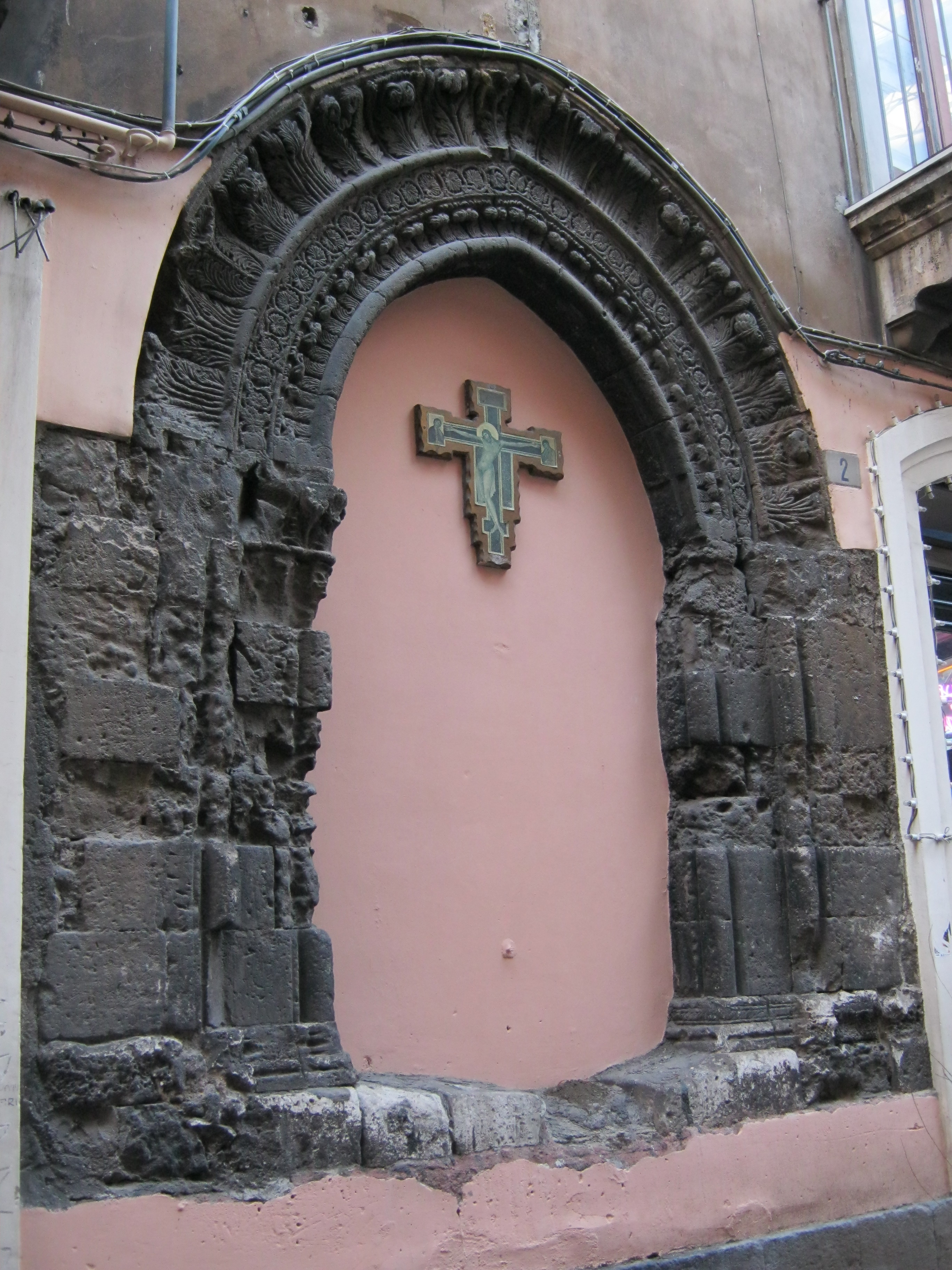 Portale appartenuto all'antica chiesa di San Giovanni de' Fleres (o di Gerusalemme), in stile Gotico-catalano o chiaramontano (XIV-XV secolo). La chiesa venne demolita nel 1896.